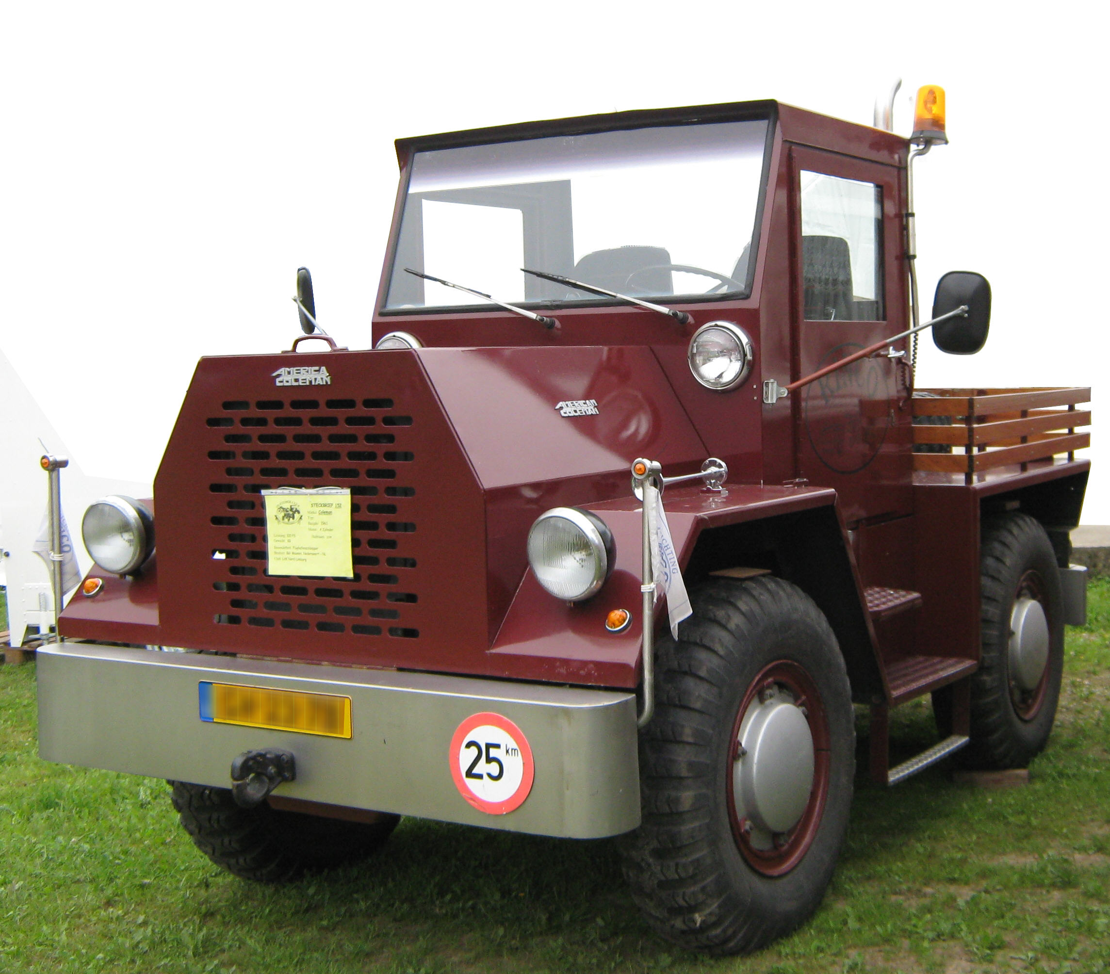 American Coleman Flughafen-Schlepper, Baujahr 1961, 4 Zylinder, 73 KW